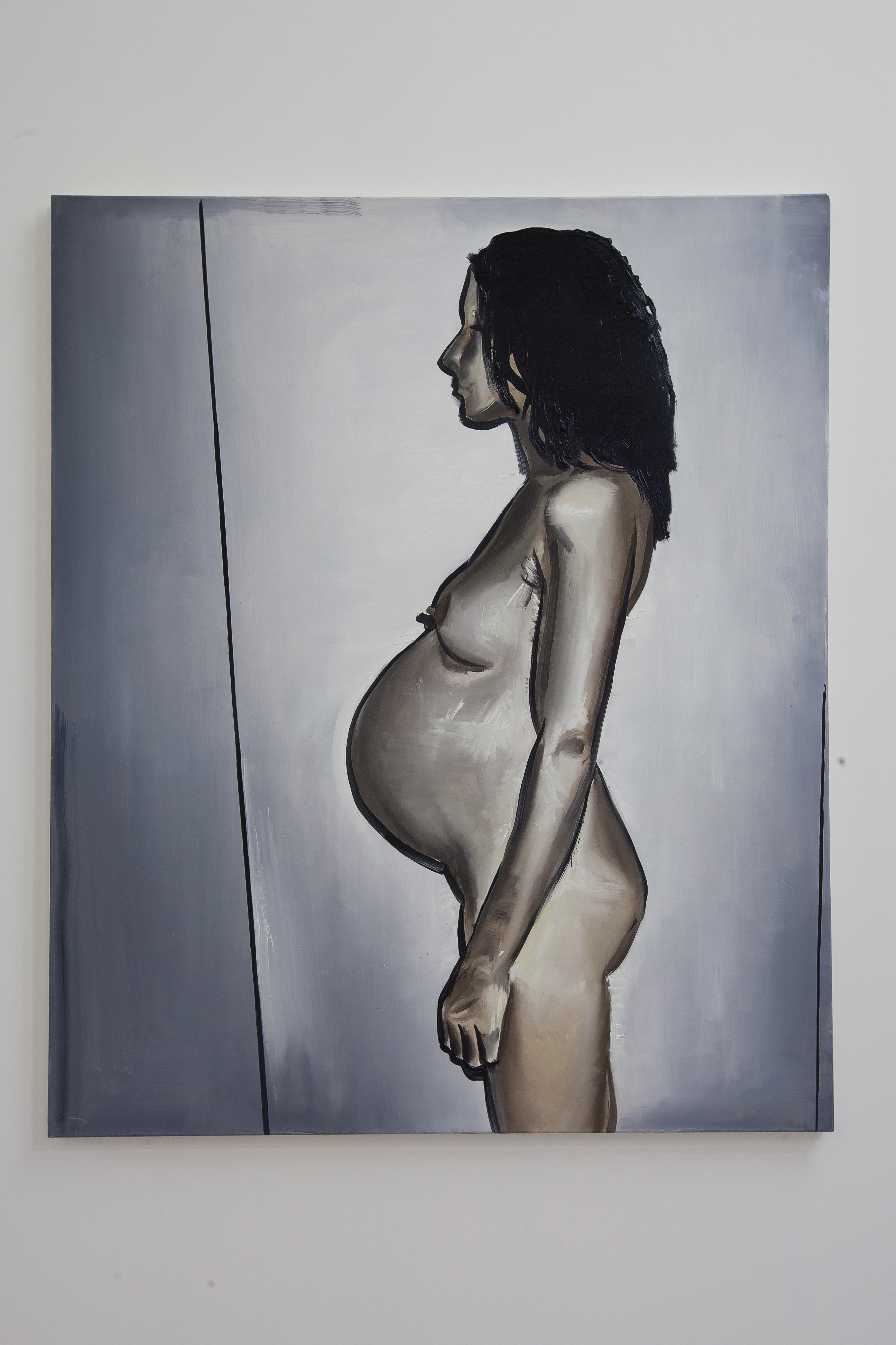 Wilhelm Sasnal, uznawany przez wielu krytyków za czołowego malarza swojego pokolenia, w swojej twórczości kieruje się głównie emocjami, przerabiając na malarstwo wszystko, co go zajmuje, intryguje i fascynuje. Bez tytułu (Anka) to jeden z licznych obrazów artysty przedstawiających członków jego rodziny (żona Anka i dzieci, Kacper i Rita). Wyróżnia się jednak siłą przedstawienia. Naga żona w ciąży to kobieta wyemancypowana, podmiotowa, samodzielna. Przedstawienie to kontrastuje ze znanymi z historii sztuki wyobrażeniami macierzyństwa, które akcentowały raczej tkliwość, emocjonalne ciepło czy oczekiwanie. Kobieta-ikona na obrazie Sasnala wyróżnia się pierwotną siłą i współczesną samowiedzą.